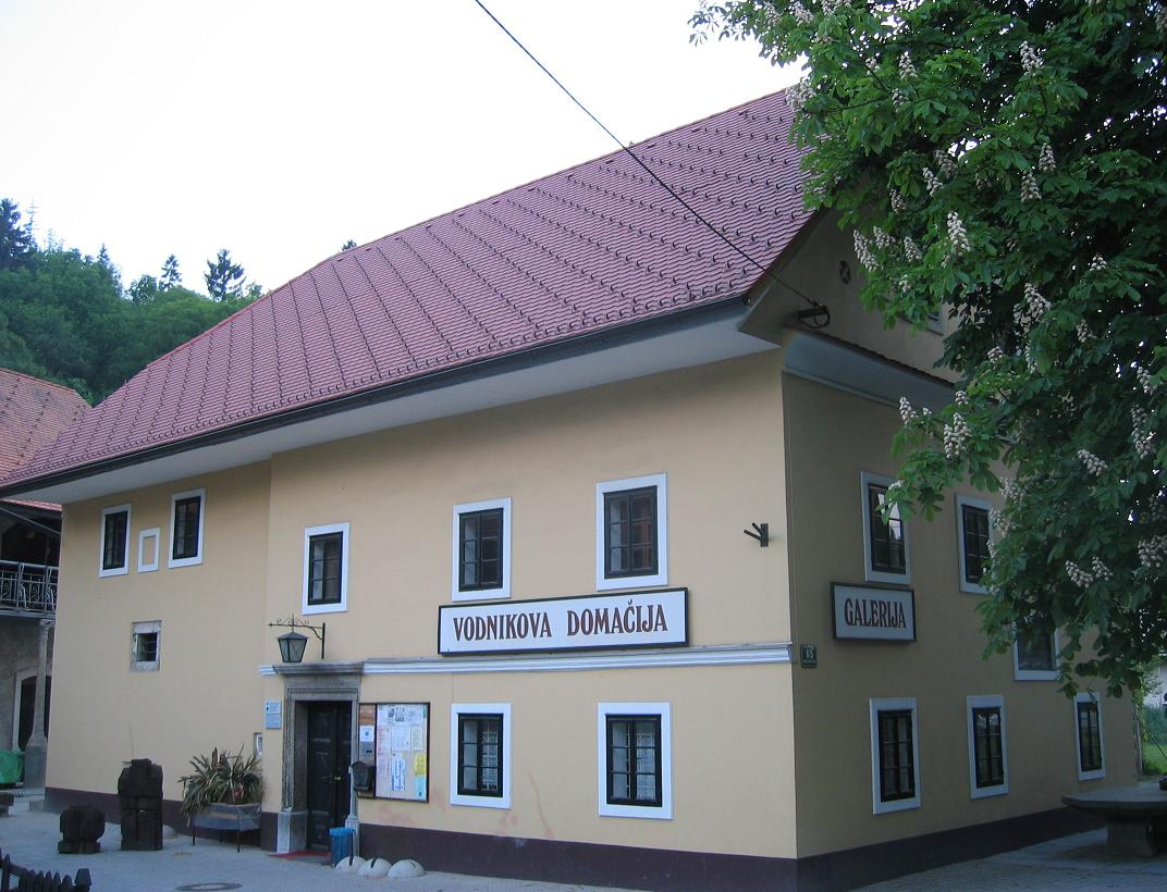 Vodnik house, Ljubljana photo:Ziga 19:03, 13 May 2006 (UTC)